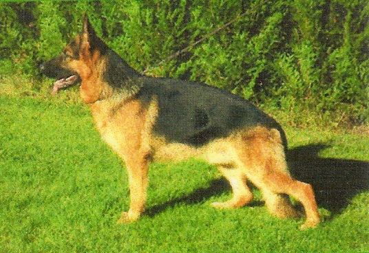 Saffo.jpg